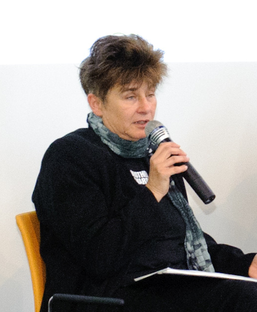 Rena Tangens